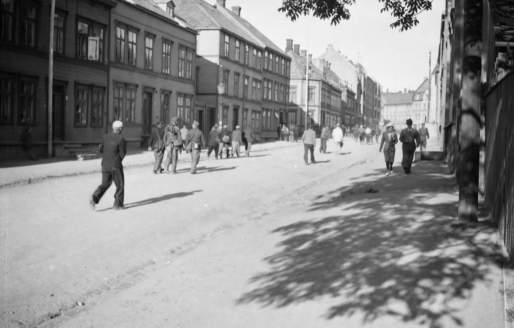 Format: Fotonegativ Dato / Date: 05.08.1943 Fotograf / Photographer: Fritz Petter Digre (1897 - 1992) Sted / Place: Østersunds gate, Trondheim Google Street View: goo.gl/maps/68IyE Wikipedia: Dora Wikipedia: Organisation Todt Eier / Owner Institution: Trondheim byarkiv, The Municipal Archives of Trondheim Arkivreferanse / Archive reference: Tor.H43.B81.F29629e - Konv 80 Merknad: Anleggsarbeidere på vei hjem fra arbeid på Nyhavna. Fotografen Fritz Petter Digre (1897 – 1992) var født på Nedre Bakklandet og bodde i Mellomveien 11 fra 1900. Han var utdannet sersjant ved underoffiserskolen på Oscarsborg og var fra 1919 ulønnet sersjant ved Agdenes festning. I 1920 – 1926 jobbet han ved Nidar Sjokoladefabrikk. I 1939 ble han innkalt til nøytralitetsvakt og deltok 9. april på Brettingen fort. I 1941 sendte Arbeidskontoret ham på anleggsarbeid. Etter krigen var han en tid i Kystartilleriet, Brigade Trøndelag, og søkte avskjed i 1948 som sersjant. Hans hobbyer var amatørfotografering og slektsgransking.